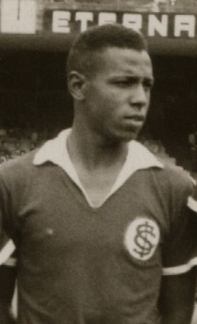 Odorico Araújo Goulart